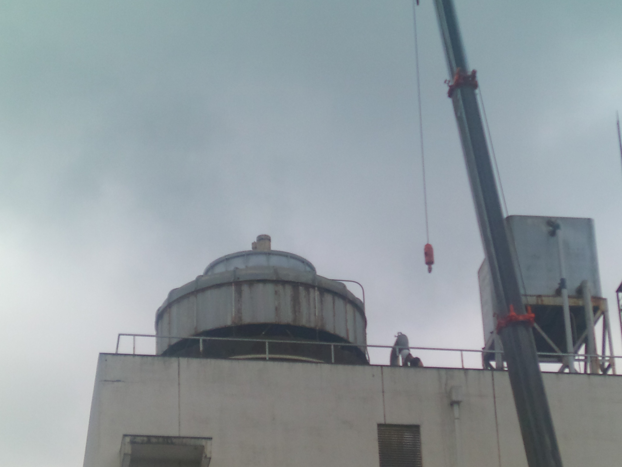 大型クーリングタワー